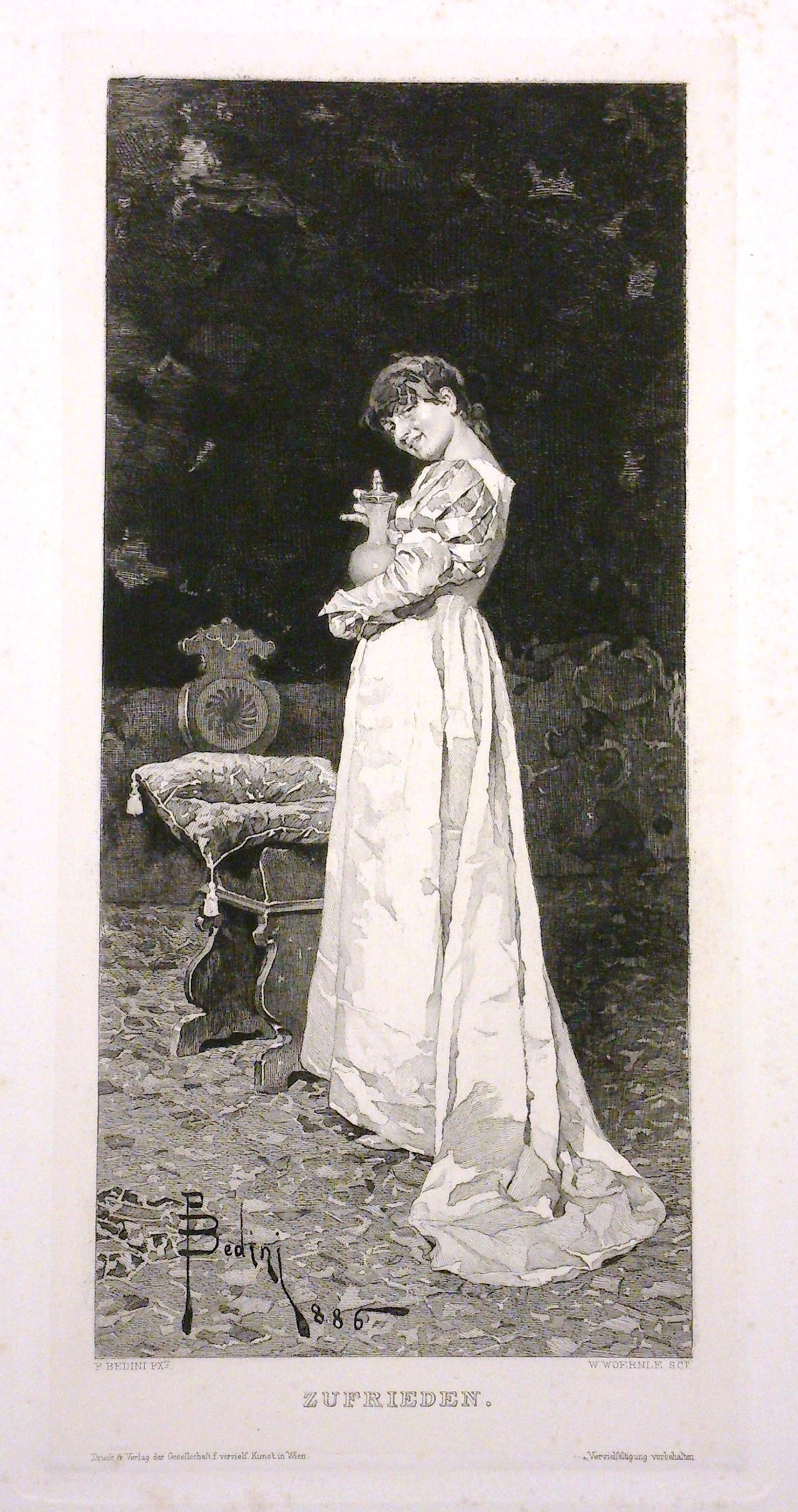 Reproduktion eines Gemäldes von Paolo Bedini als Radierung